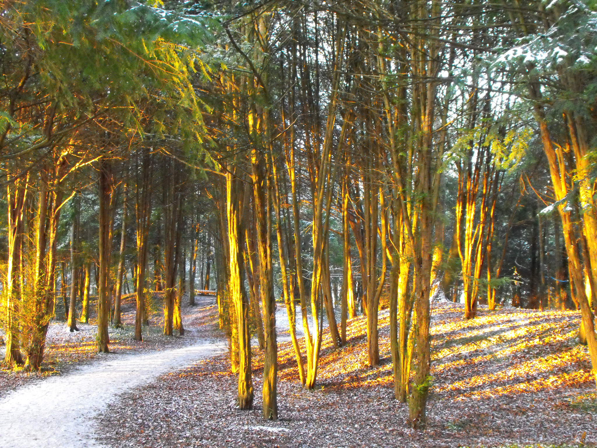 Eibenwald auf dem Lousberg mit den Halden des jungsteinzeitlichen Feuersteinbergbaus